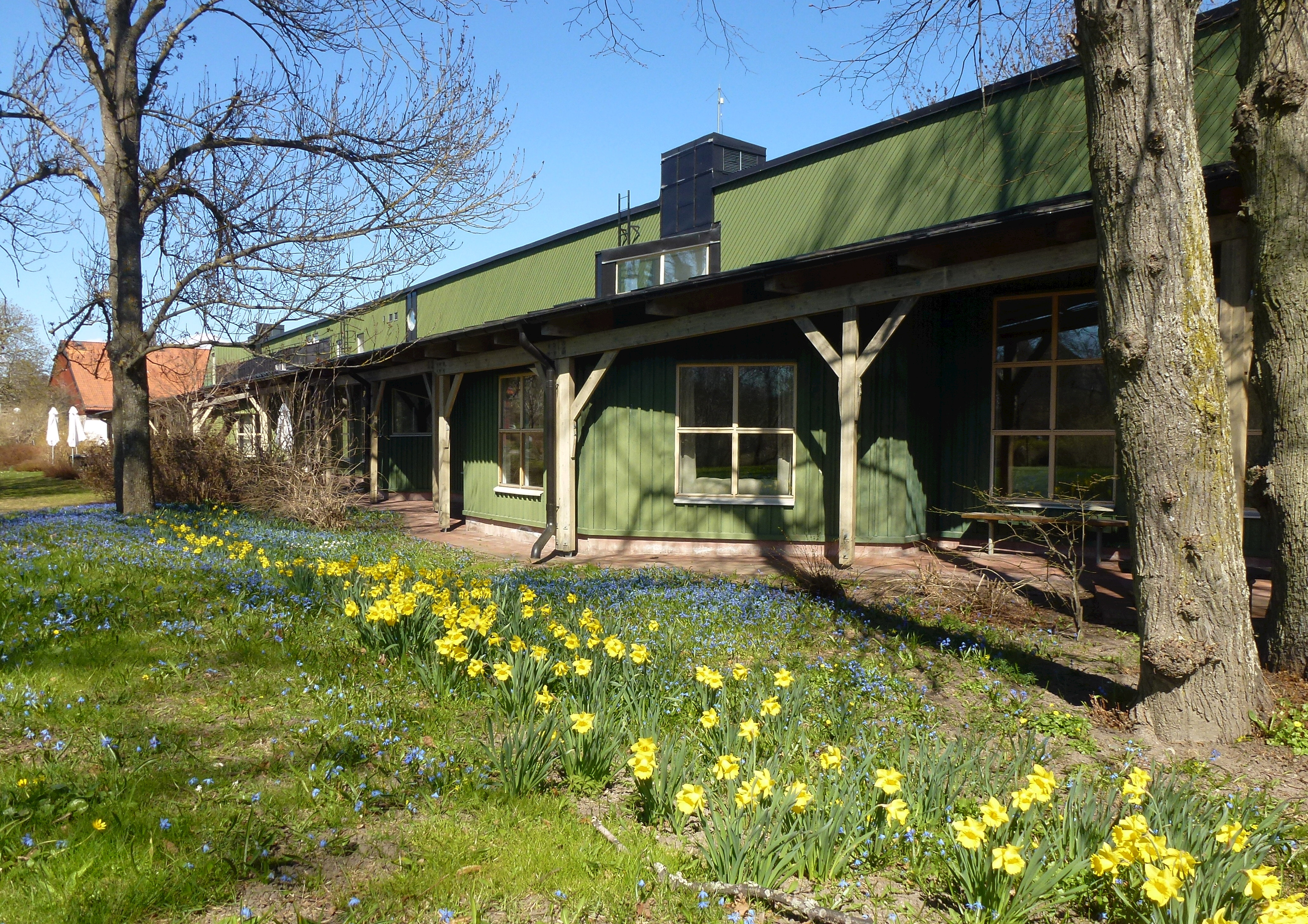 Hässelby slott annexet